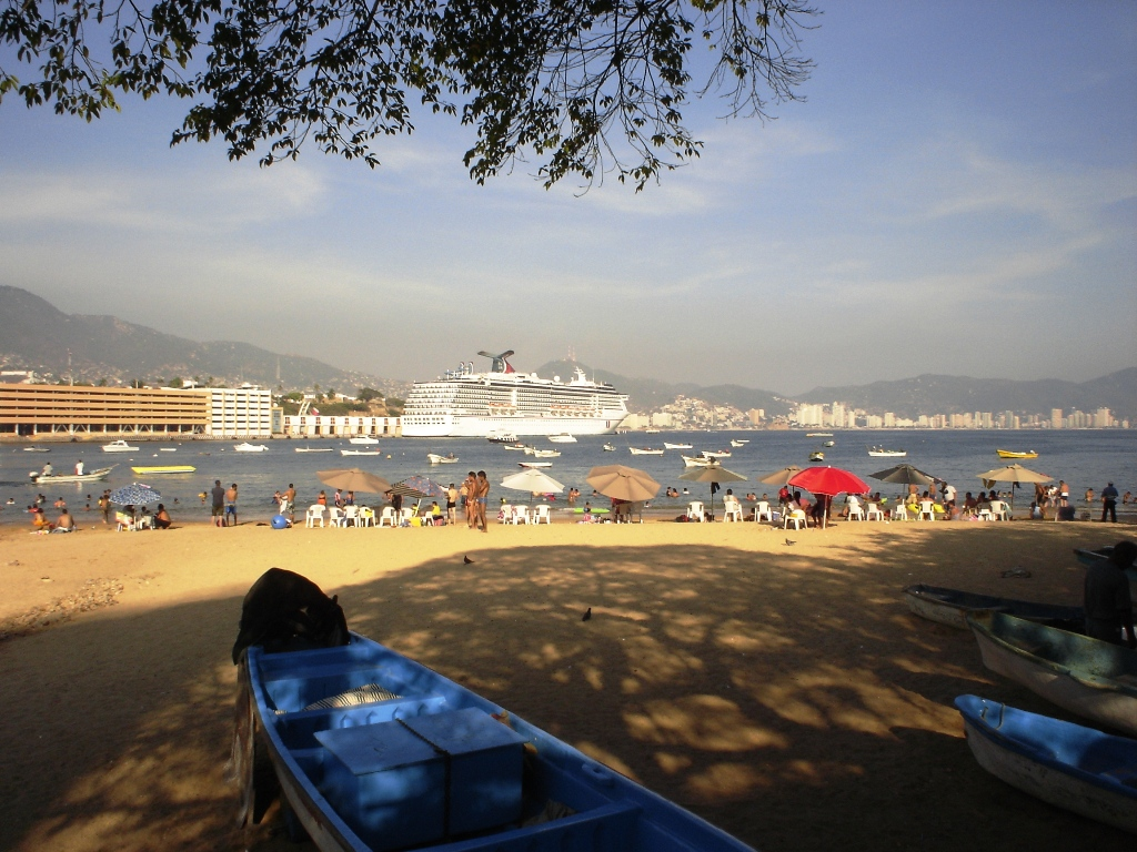 Una tarde de sabado en la Playa Tlacopanocha.